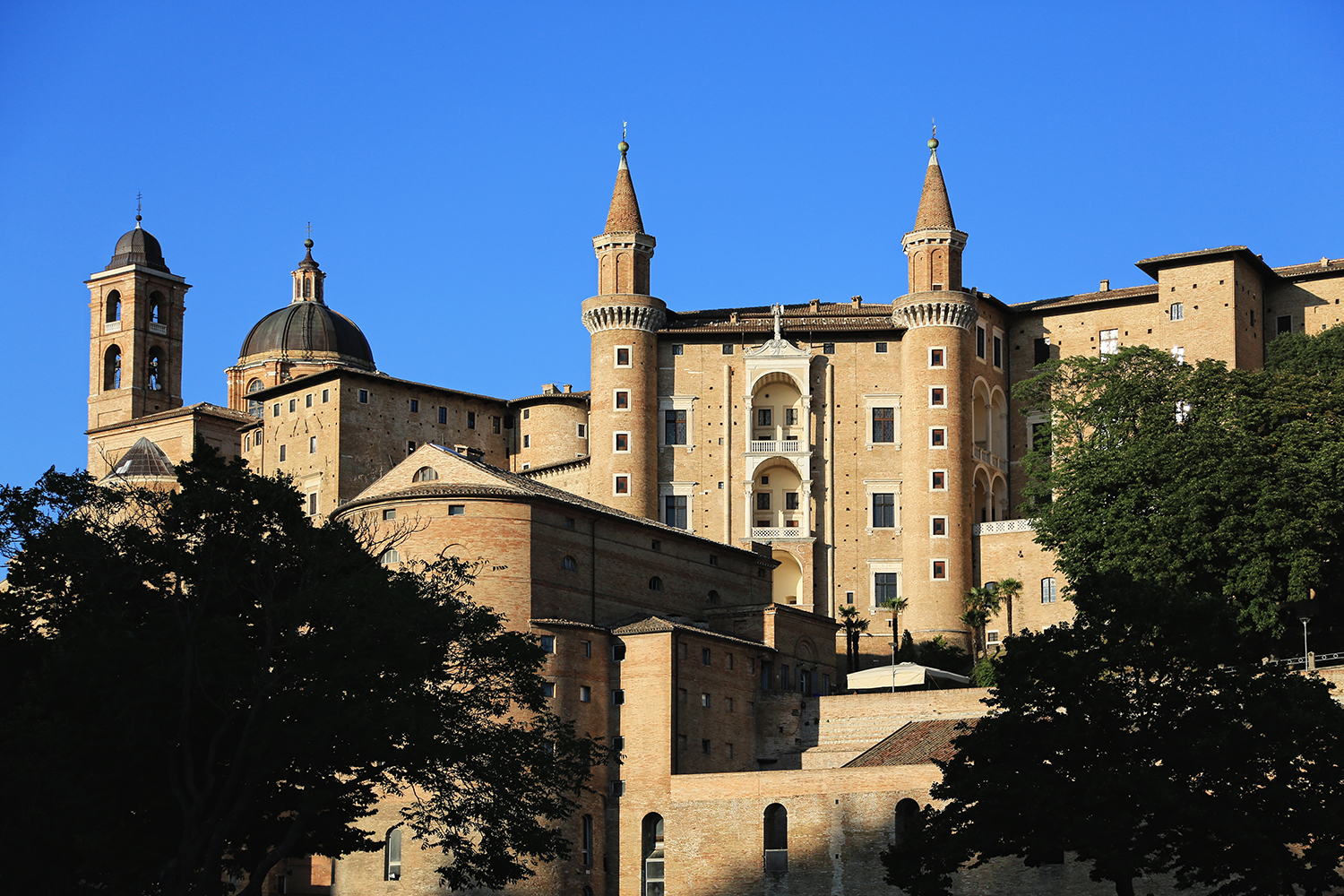 Palazzo Ducale di Urbino - Galleria Nazionale delle Marche - MIBAC This is a photo of a monument which is part of cultural heritage of Italy.